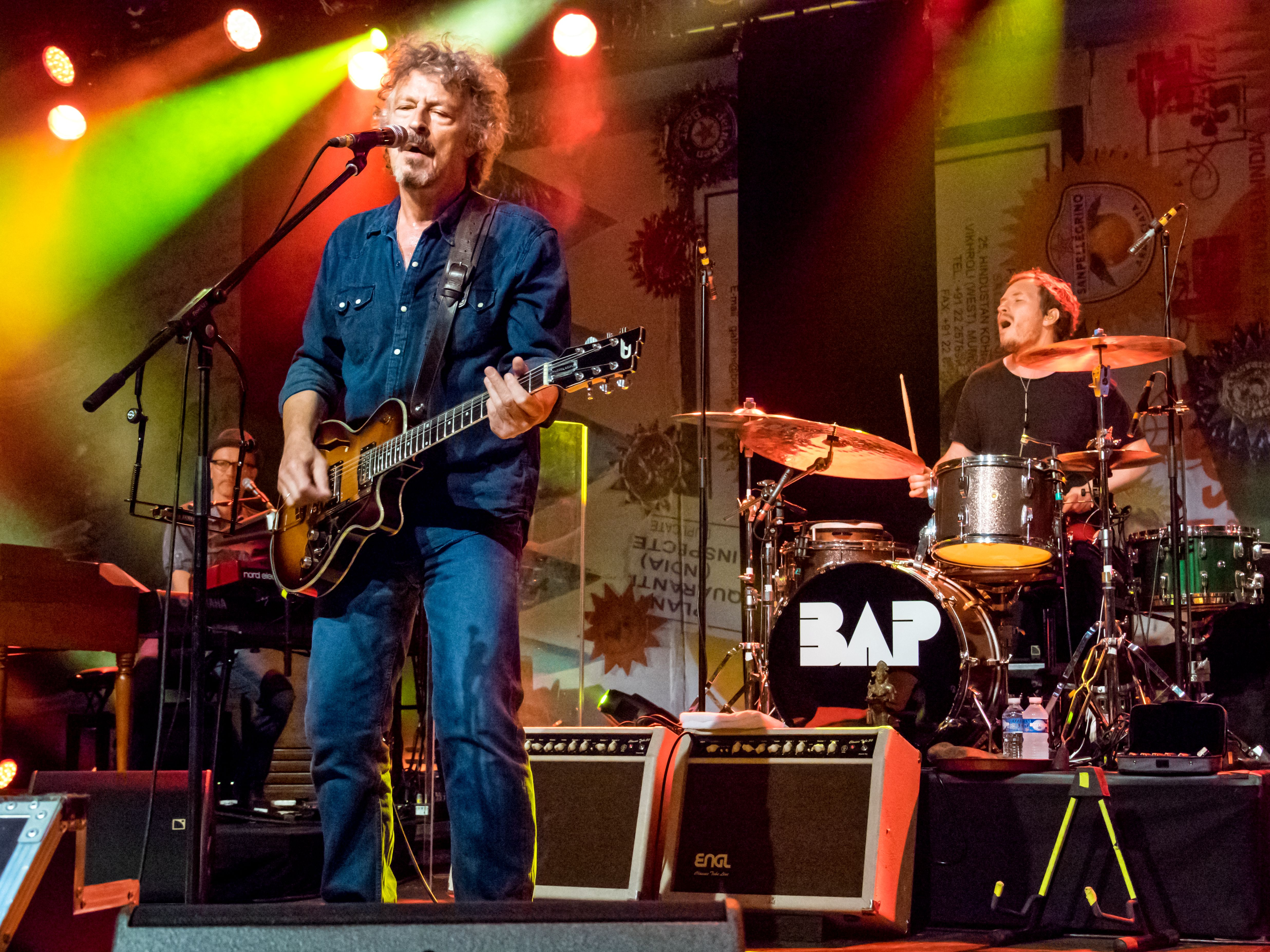 Bilder vom Zelt Musik Festival 2016 in Freiburg im Breisgau " Wolfgang Niedecken’s BAP" kurz BAP